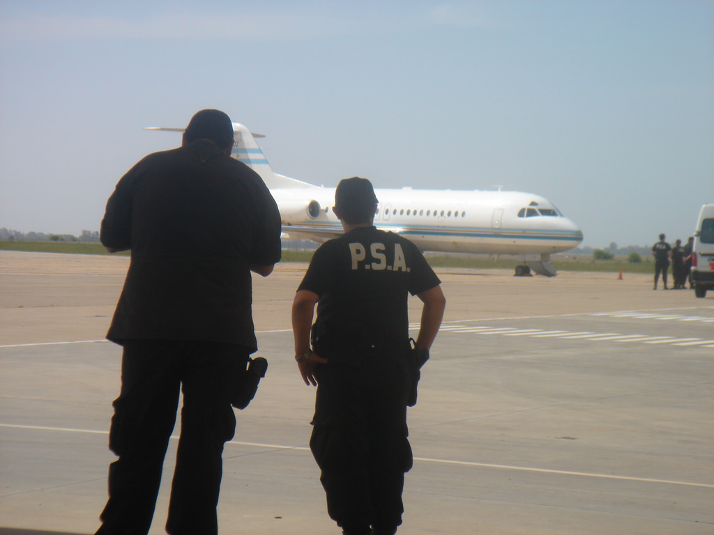 Efectivos de la Policía de Seguridad Aeroportuaria (PSA) en el Aeropuerto Internacional Islas Malvinas de la ciudad de Rosario